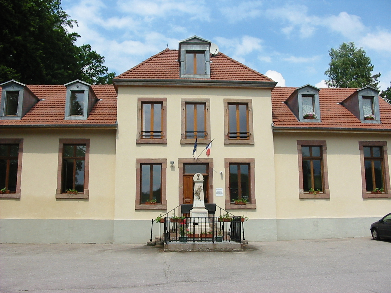 La mairie de Vienville, commune du département ds Vosges.